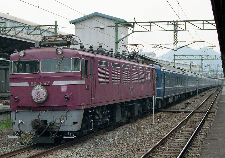 JR九州 ED76 62けん引 14系客車 寝台特急「さくら」